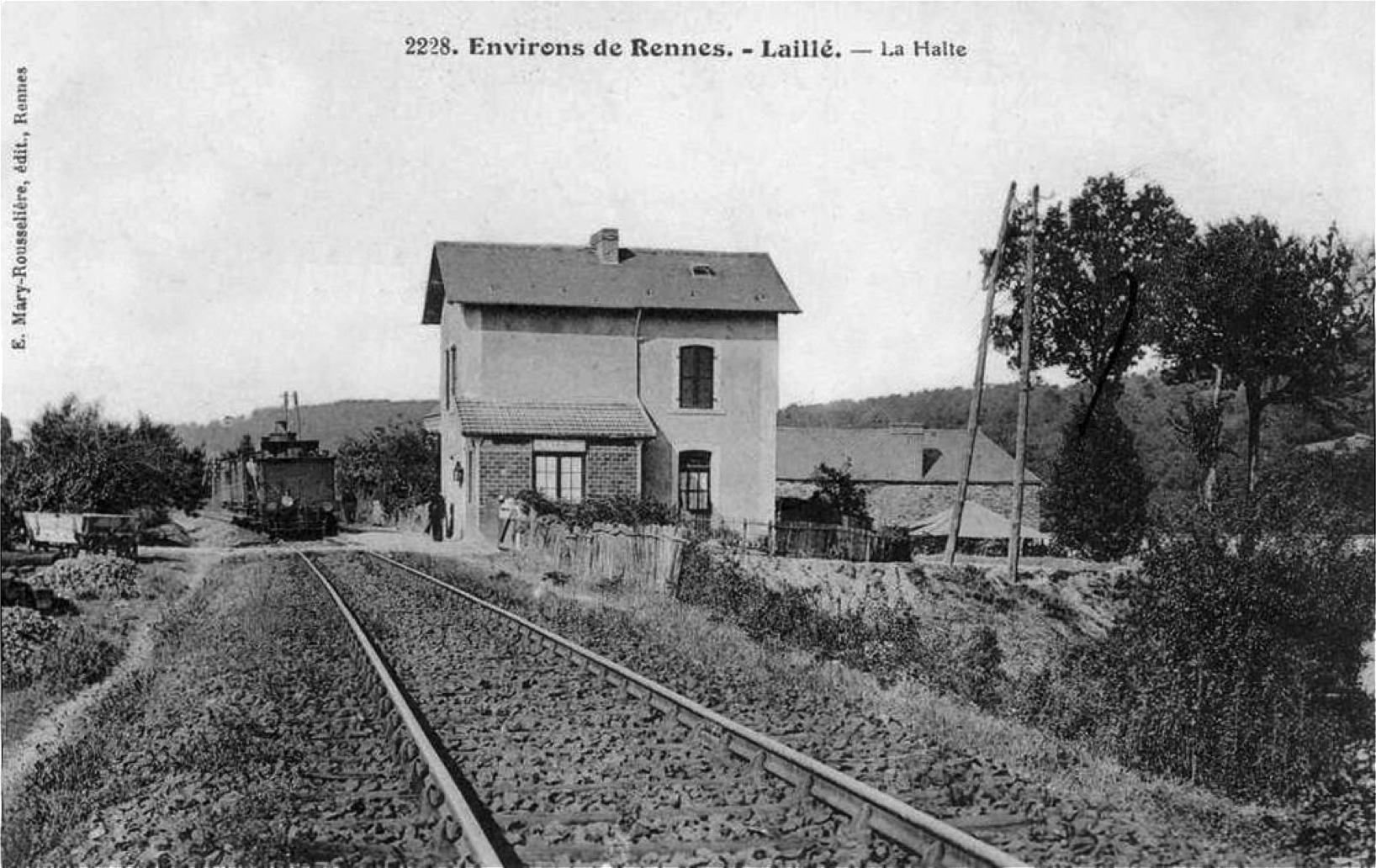 La halte de Laillé, le bâtiment du garde barrière faisant office de bâtiment voyageurs, la ligne qui est encore à voie unique et un train à vapeur.